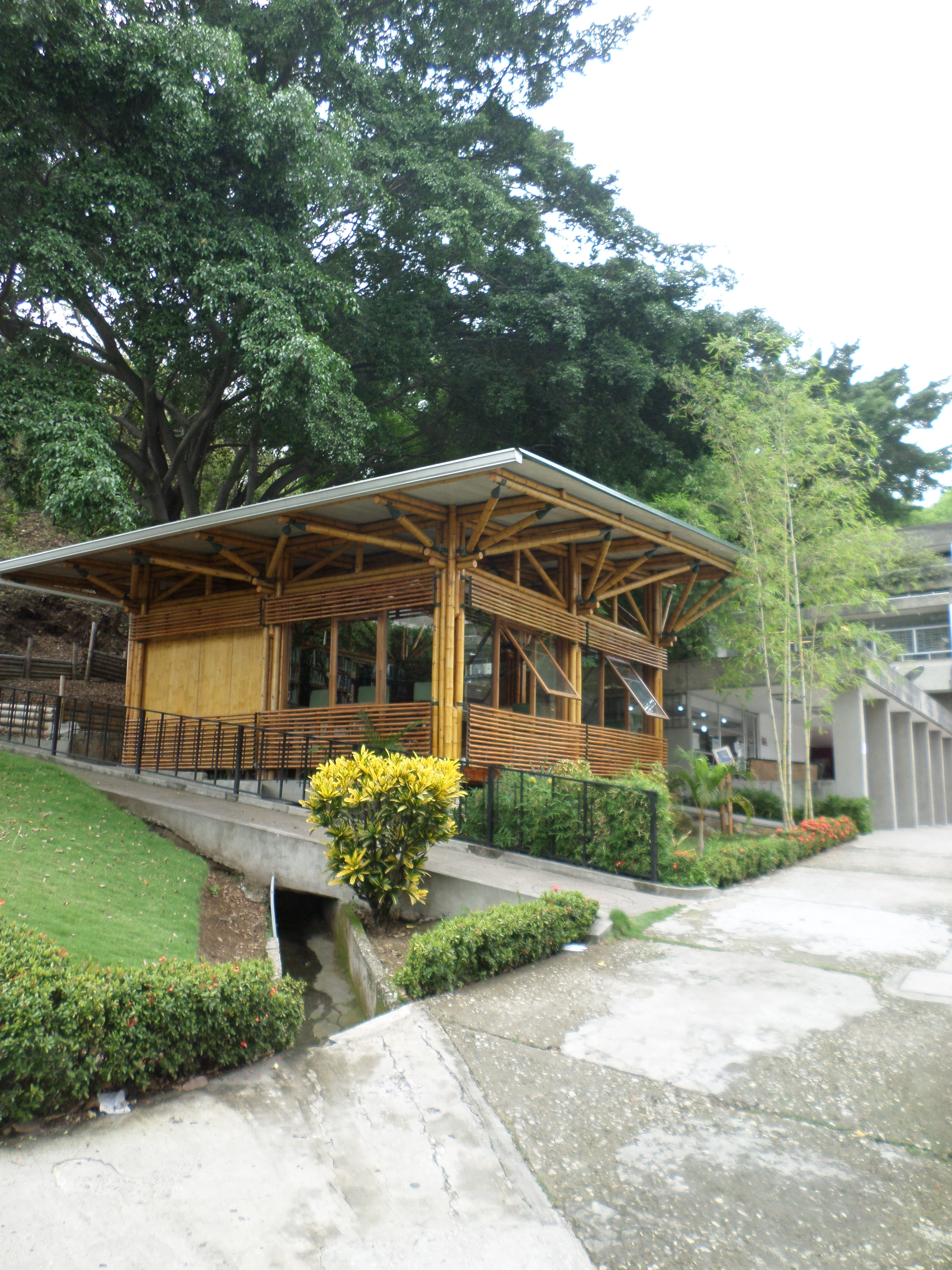 centro de bambu